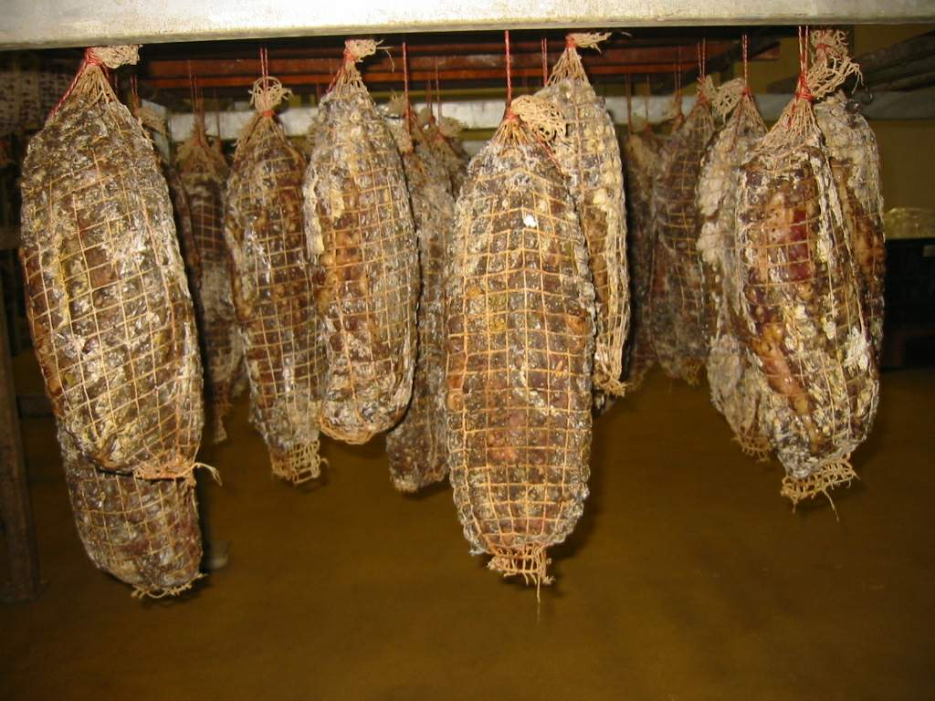 Salaison de montagne, Noël Thaurin, Moutaine, Jura, France